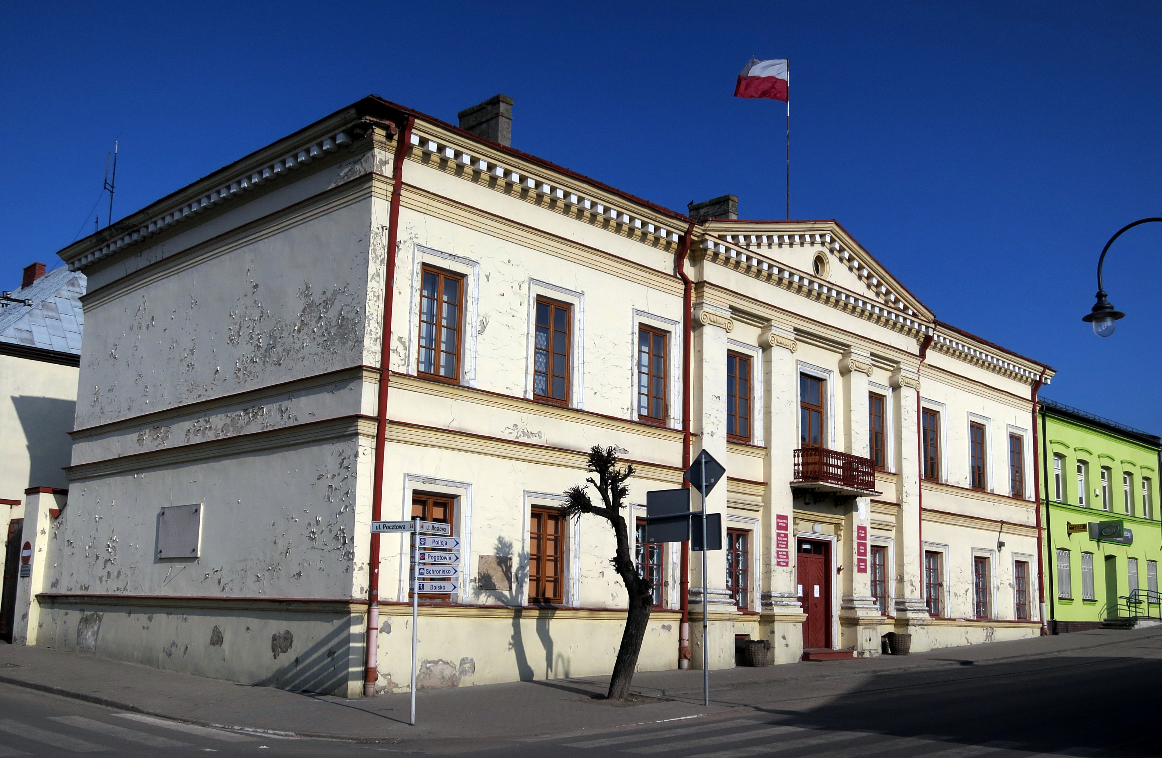 Przedbórz, ratusz, 1820